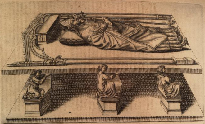 Bonifác Savojský